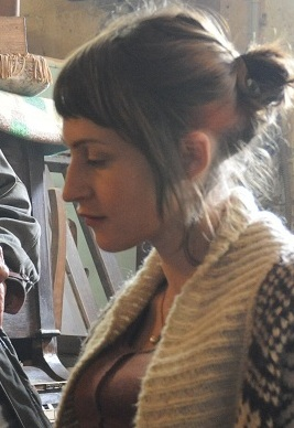 מתוך הסרט בוקר טוב אדון פידלמן